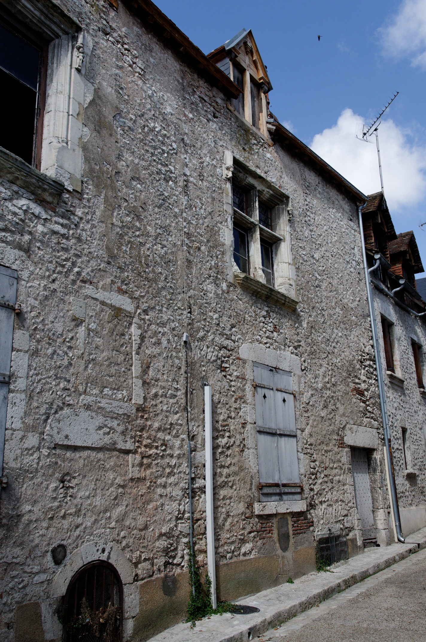 Maison du 15e siècle (siège du fief de la Bougrerie), Meung-sur-Loire, Loiret, France